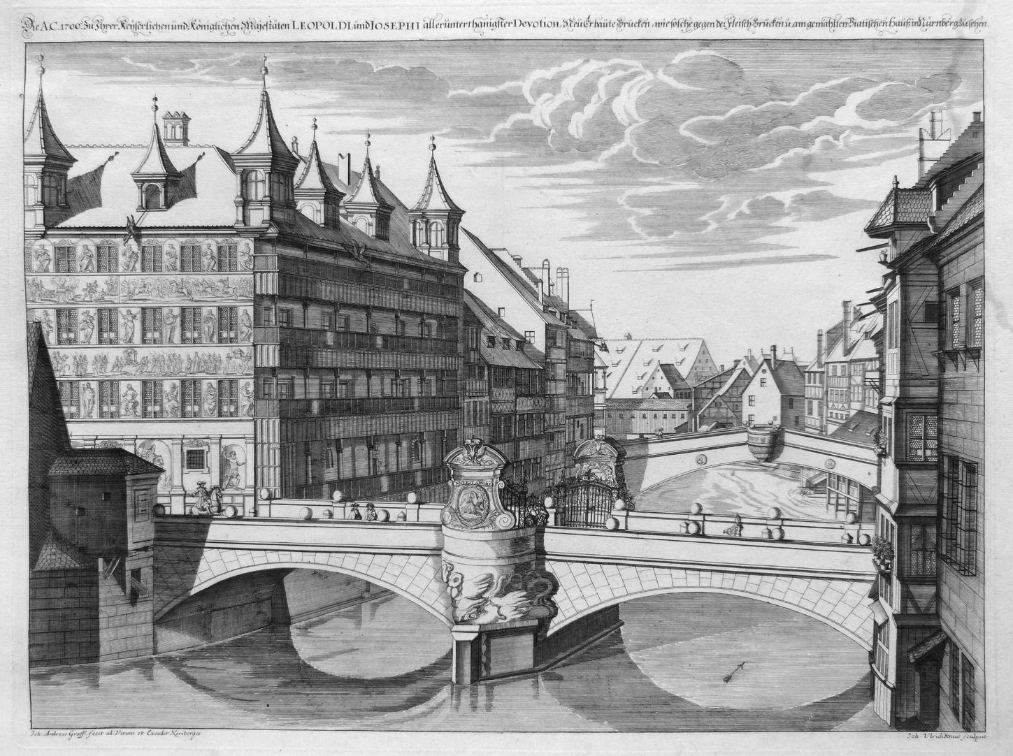 "Die A.C. 1700 . Neu erbaute Brücken, wie solche gegen der Fleisch-Brücken u. am gemahlten Viatis Hauß in Nürnberg zu sehen." Blick auf die Barfüßerbrücke, heute Museumsbrücke, dahinter die Fleischbrücke.